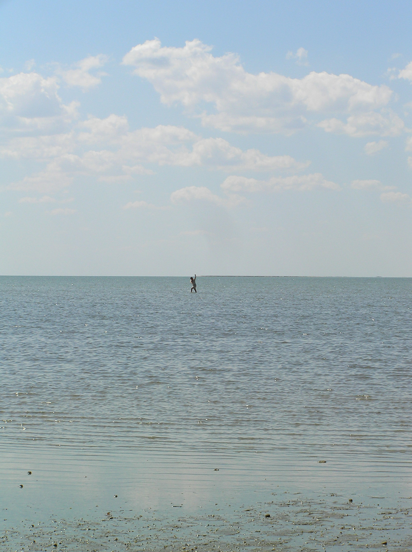 Азово-Сиваський національний природний парк, Генічеський район, Херсонська обл.